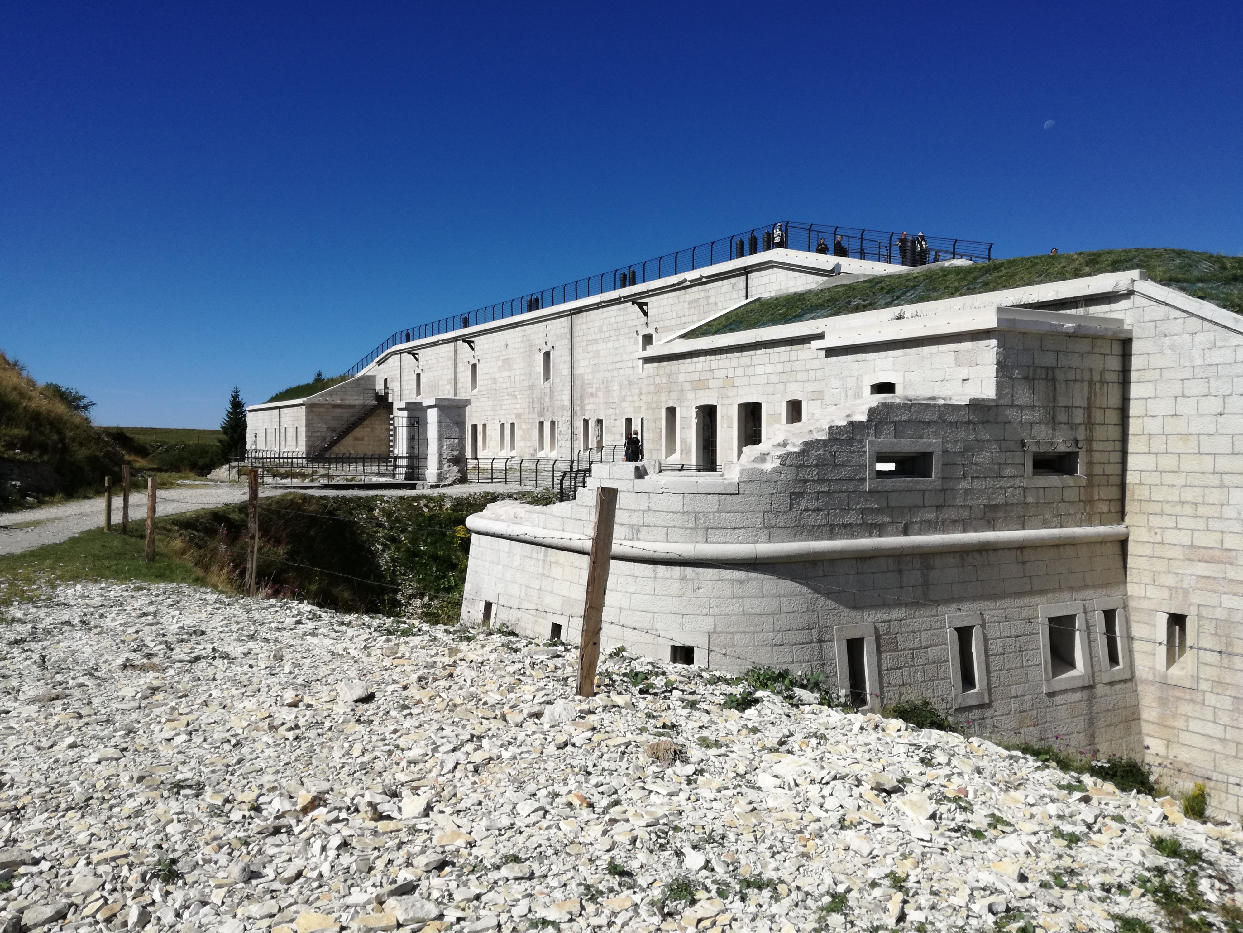 Forte Lisser, blocco di casematte, entrata, fossato di gola e caponiera dopo i restauri per il centenario